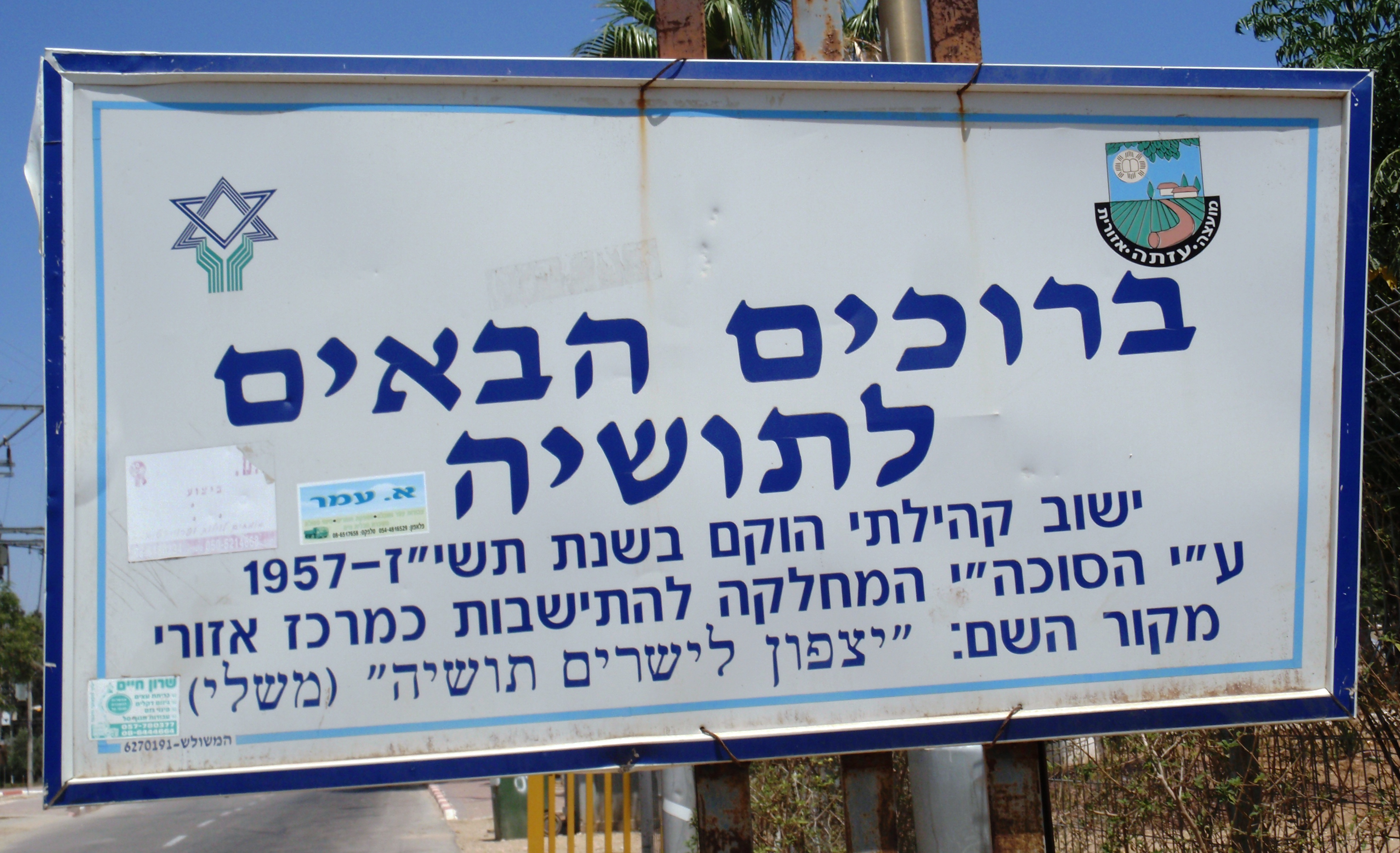 Moshavim שלט הכניסה למושב